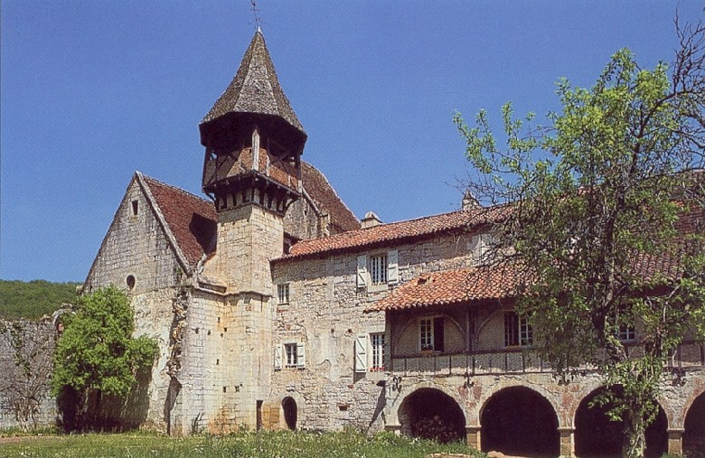 Date du cliché : septembe 2001.